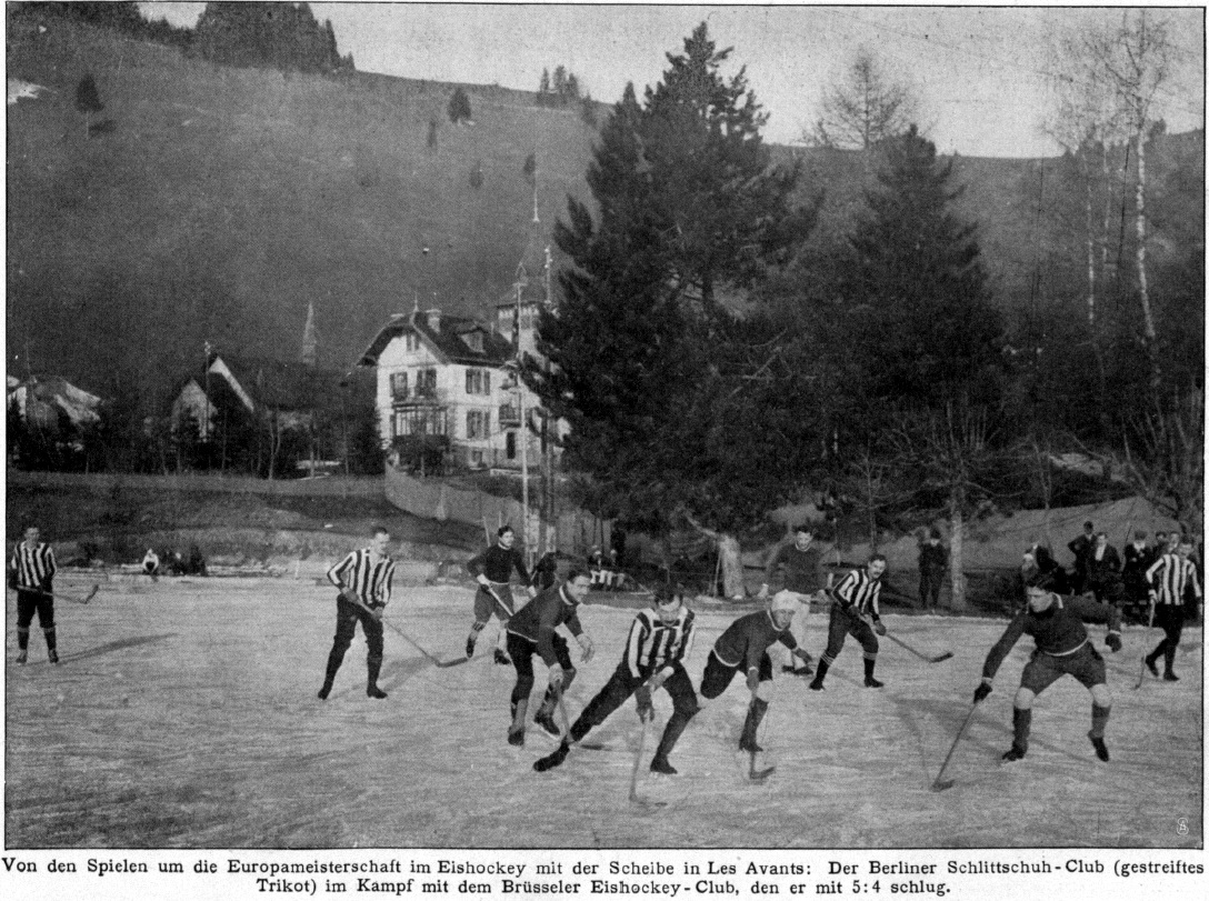 Von den Spielen um die Europameisterschaft im Eishockey mit der Scheibe in Les Avants: Der Berliner Schlittschuh-Club (gestreiftes Trikot) im Kampf mit dem Brüsseler Eishockey-Club, den er mit 5:4 schlug.